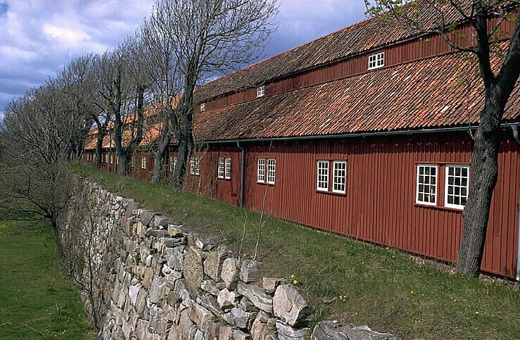 Byggnaden Repslagarbanan på Lindholmen. Bilden troligen från omkring 1970. Motiv: Repslagarbanan Nyckelord: Byggnadsminnen, Riksintressen, Världsarv Kategori: Örlogsbas Byggnaden Repslagarbanan på Lindholmen. Bilden troligen från omkring 1970.